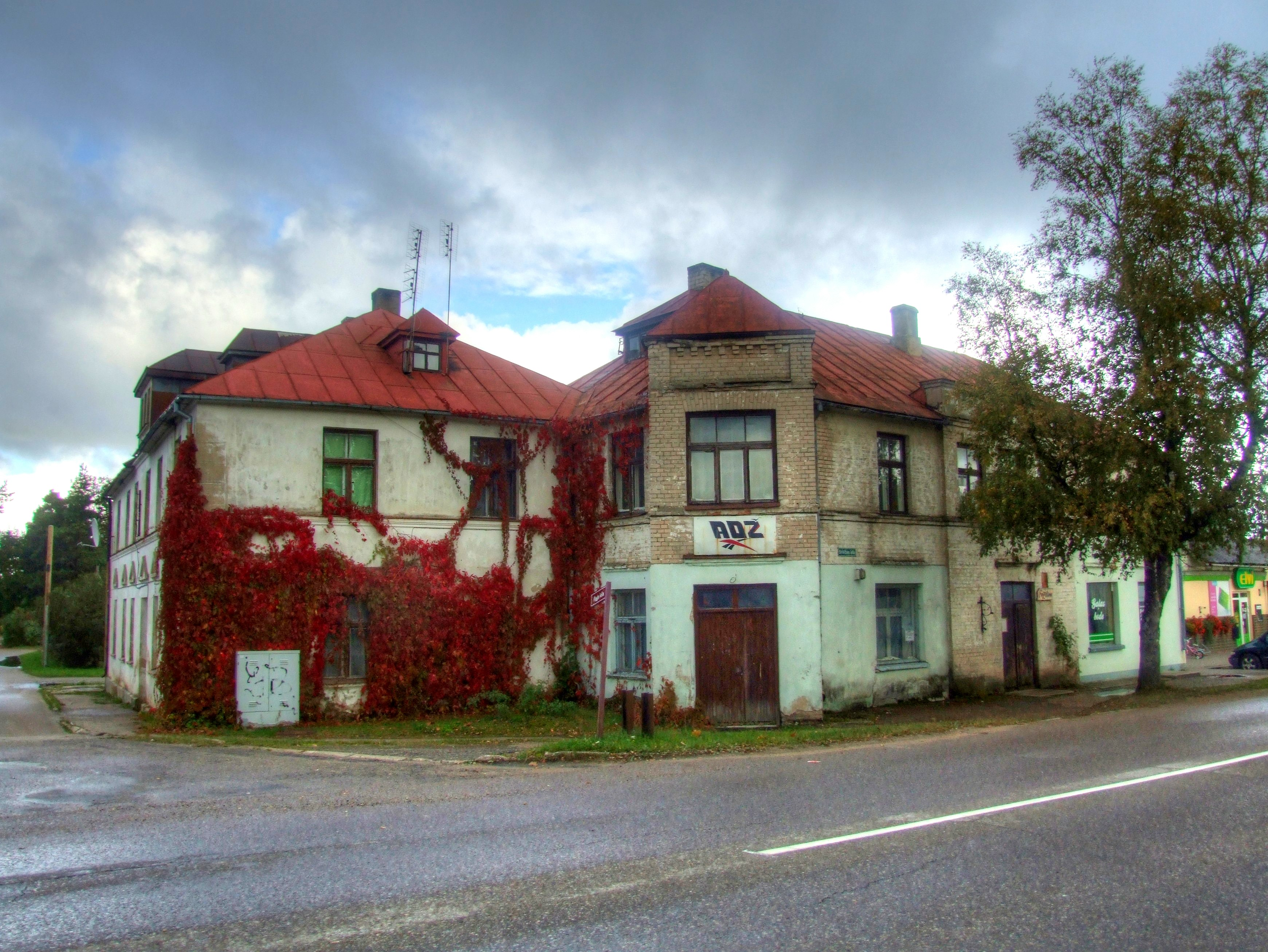 Stendes pilsēta